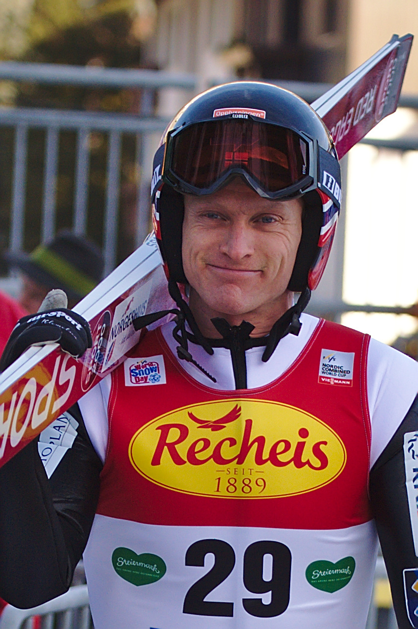 Haavard Klemetsen (NOR)